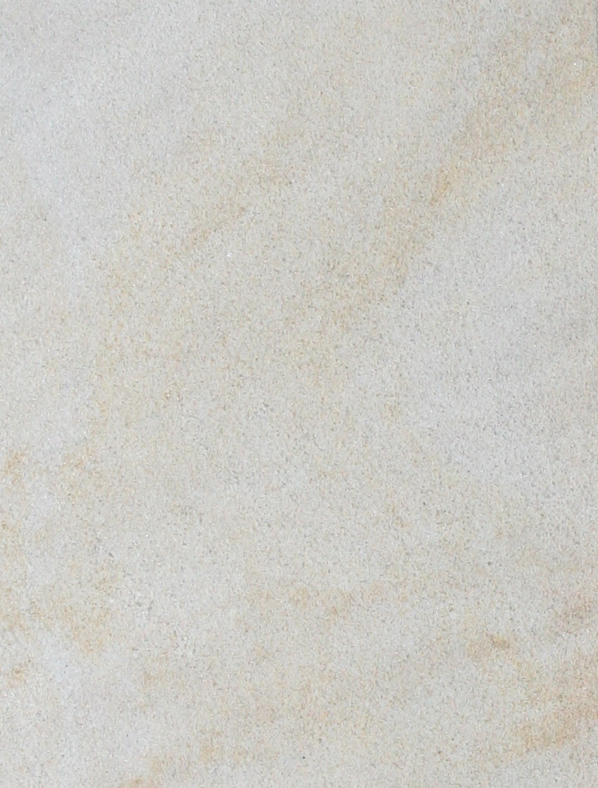 Burgpreppacher Sandstein, Burgpreppach in Unterfranken, Oberer Keuper